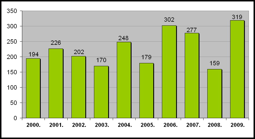 Произведено_тона_кајсија_у_Републици_Српској_(2000-2009)